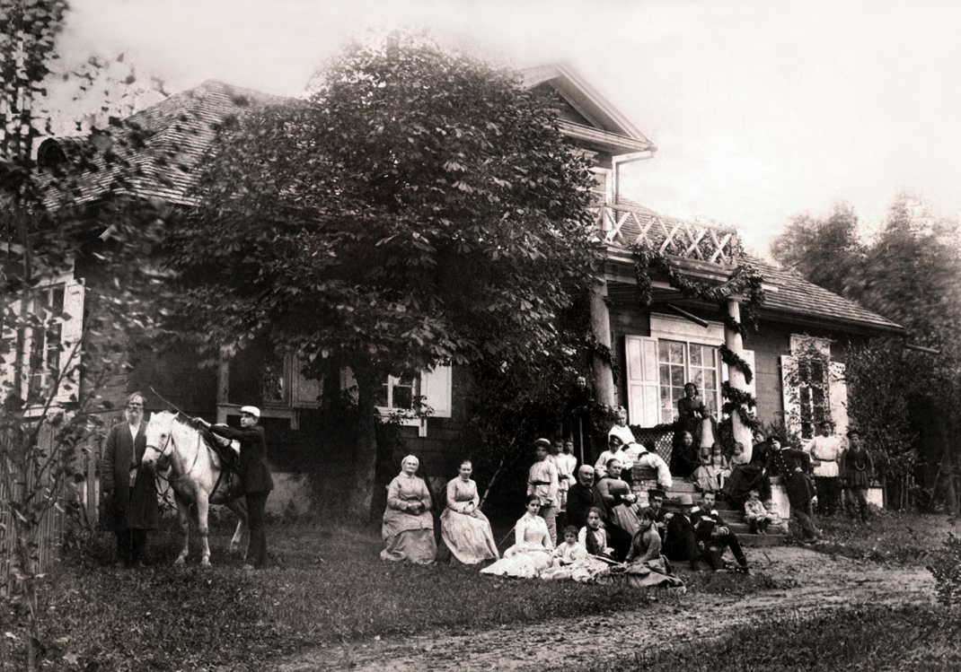 Дзень народзінаў Роберта Роланда ў маёнтку Гародня, 28 ліпеня (ст. ст.)1887 года